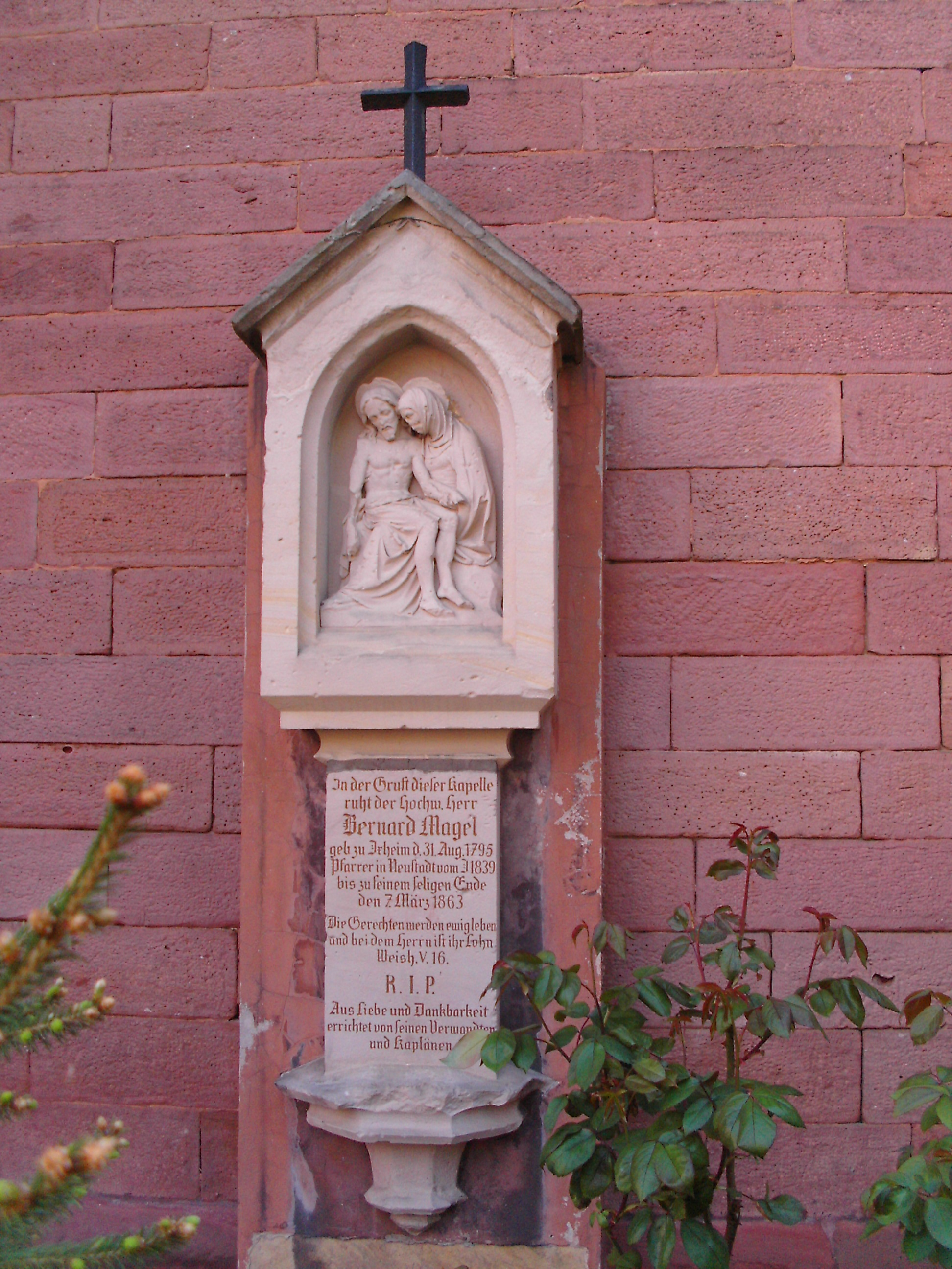 Pfarrer Bernhard Magel, Grabdenkmal, Neustadt an der Weinstraße